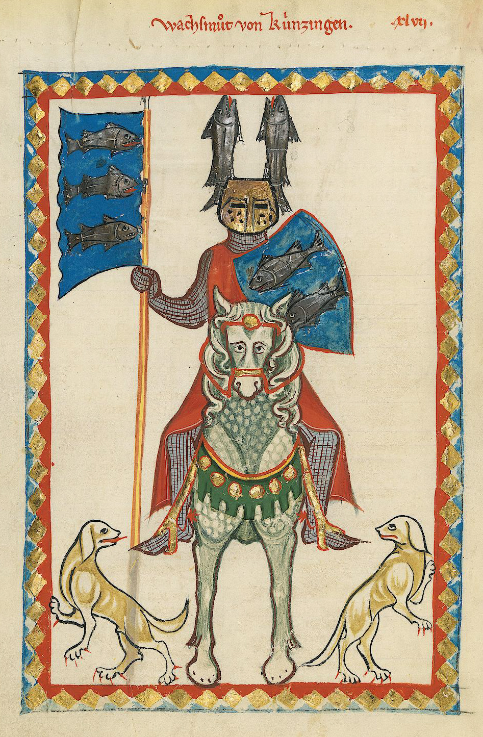 Codex Manesse, UB Heidelberg, Cod. Pal. germ. 848, fol. 160v: Wachsmut von Künzingen